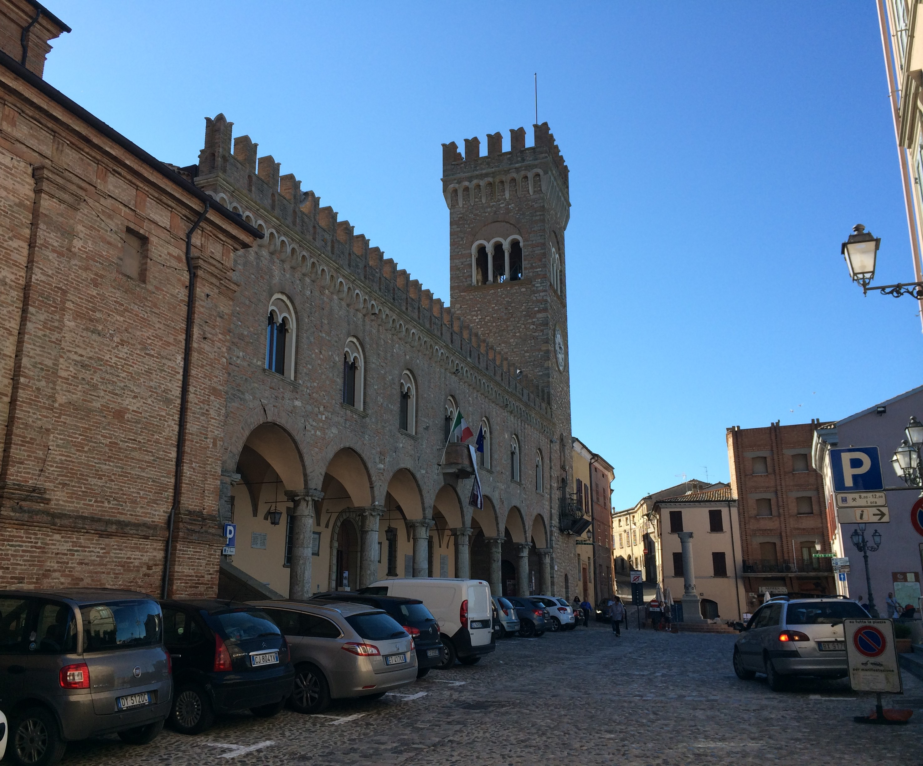 Piazza della Libertà, Bertinoro (FC)